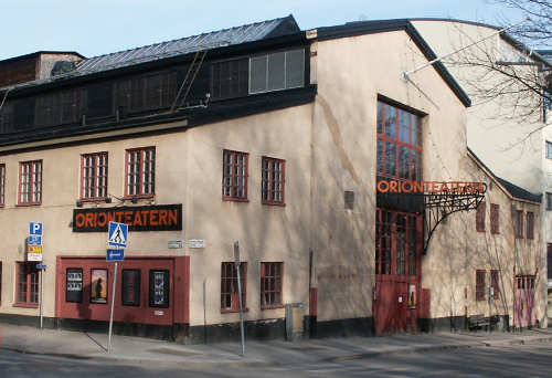 Orionteatern, Stockholm, Sweden.